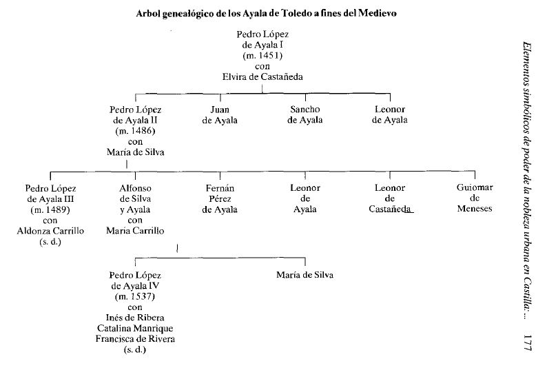 Arbol genealógico de los Ayala en Toledo